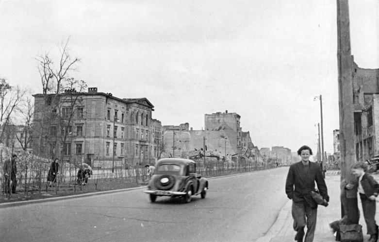 Berlin, Stalinallee, Ruinen, Trümmer Zentralbild Bödel 1 Wi. 5928-50 25.5.50 5 Jahre nach der Kapitulation, Berlin, Stalinallee